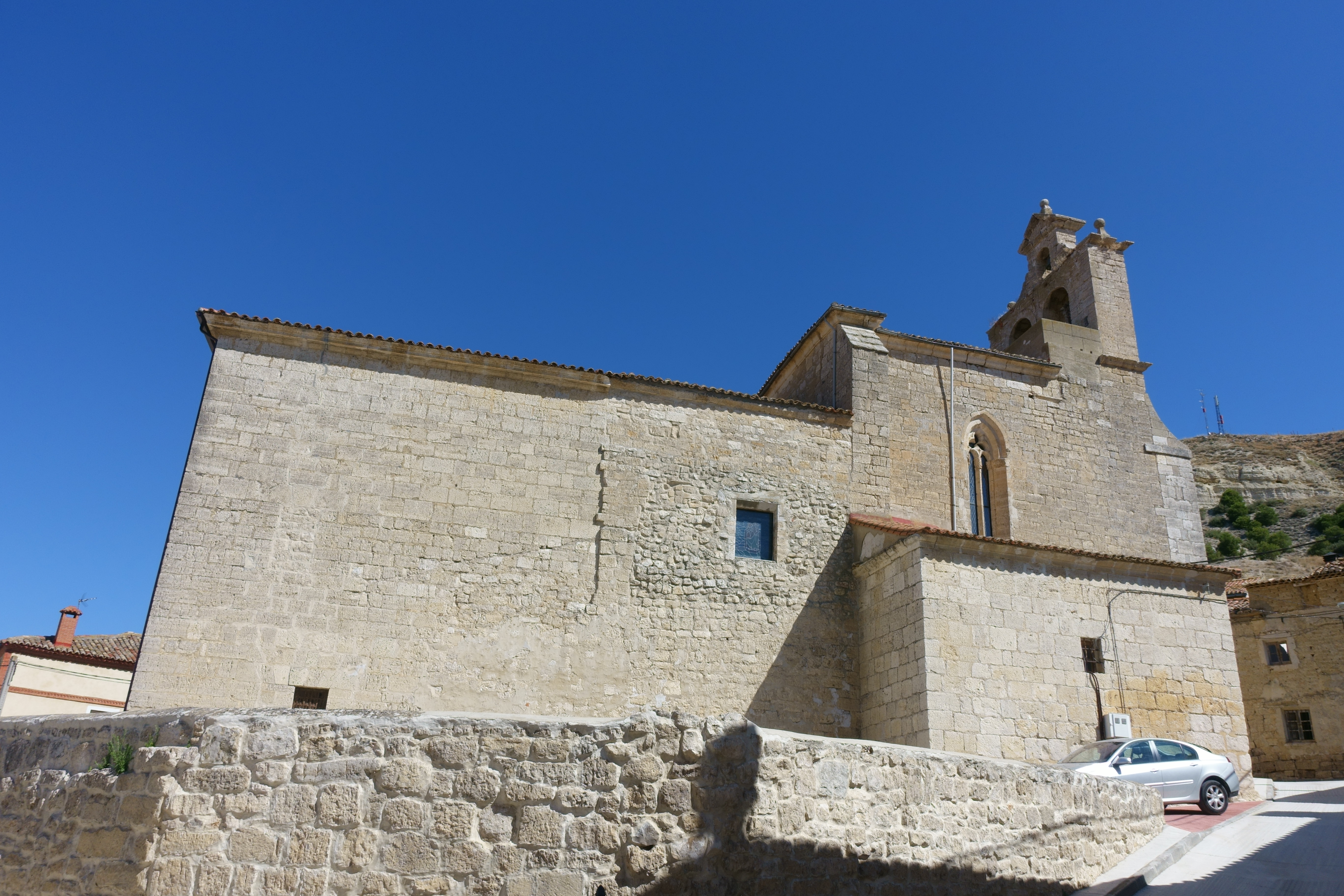 Iglesia de San Miguel en Hornillos de Cerrato (Palencia, España).